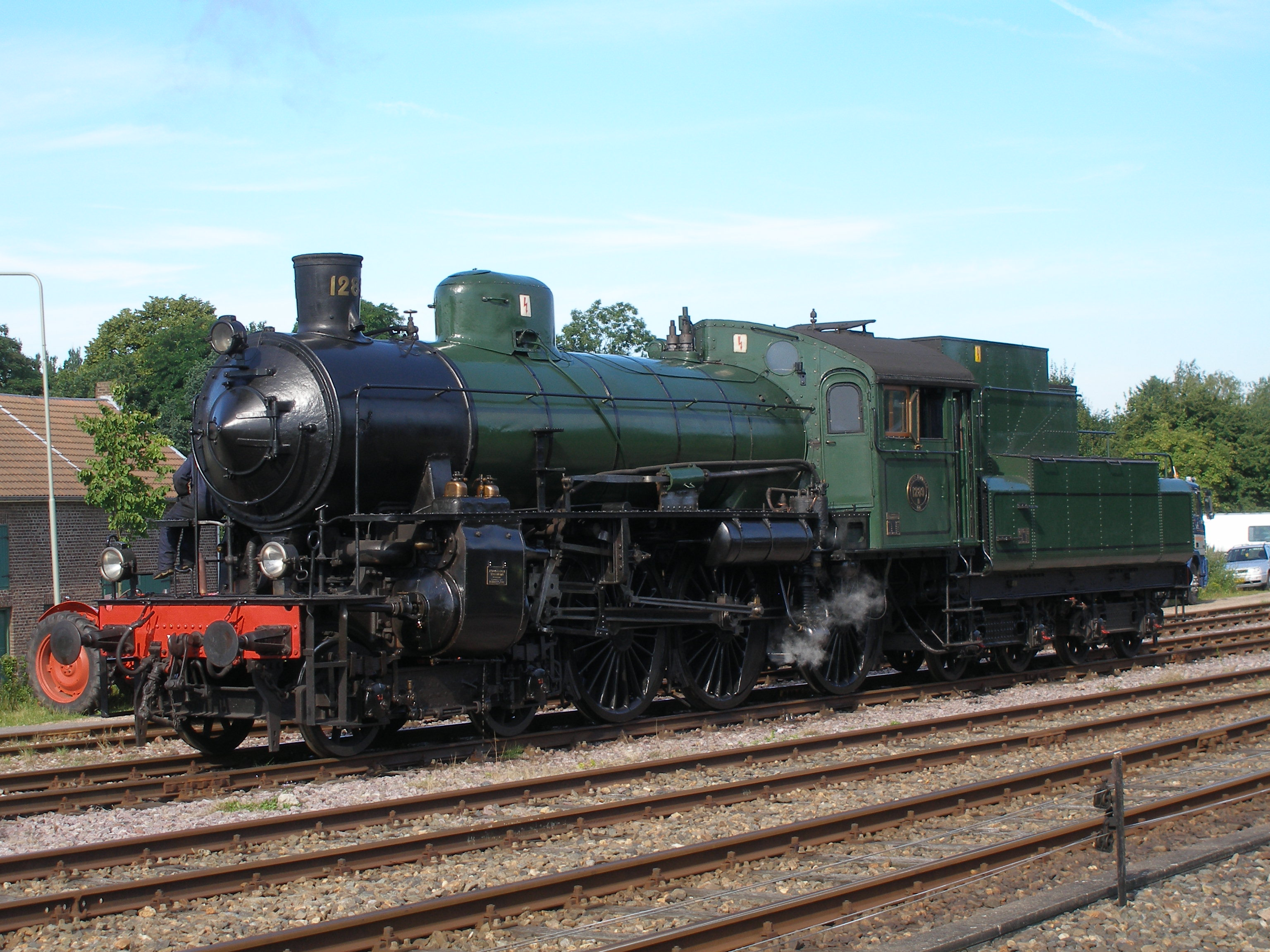 Stoomlocomotief B 1289 in Simpelveld tijdens de Stoomtreindagen van de Zuid-Limburgse Stoomtrein Maatschappij in 2008.